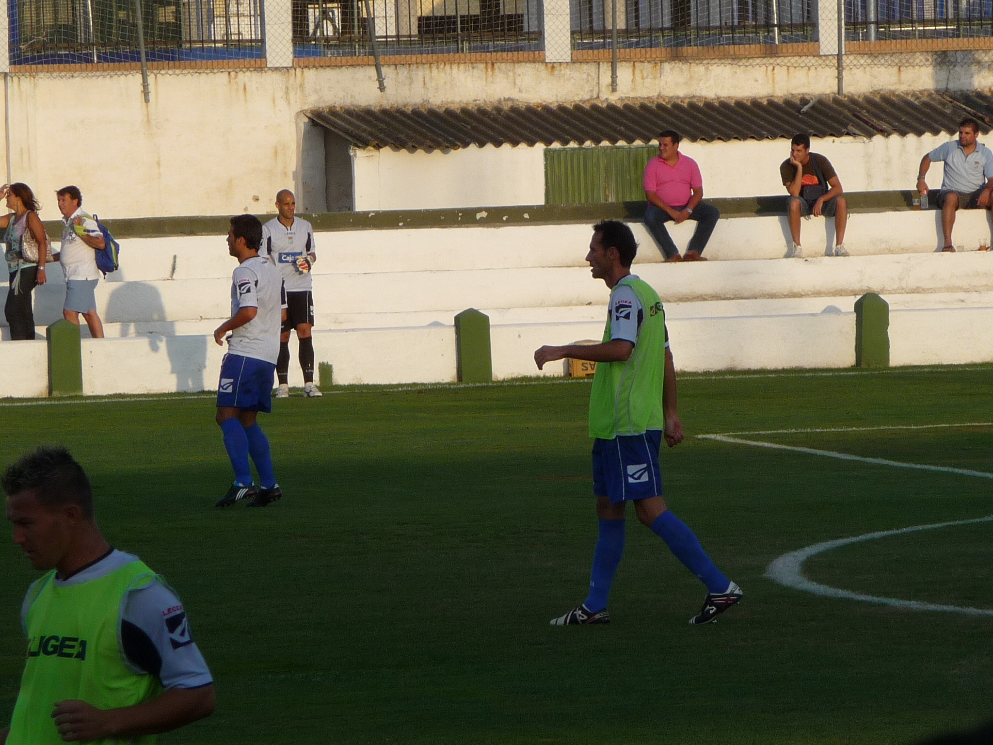 Moreno-XerezCD-p1040358.jpg